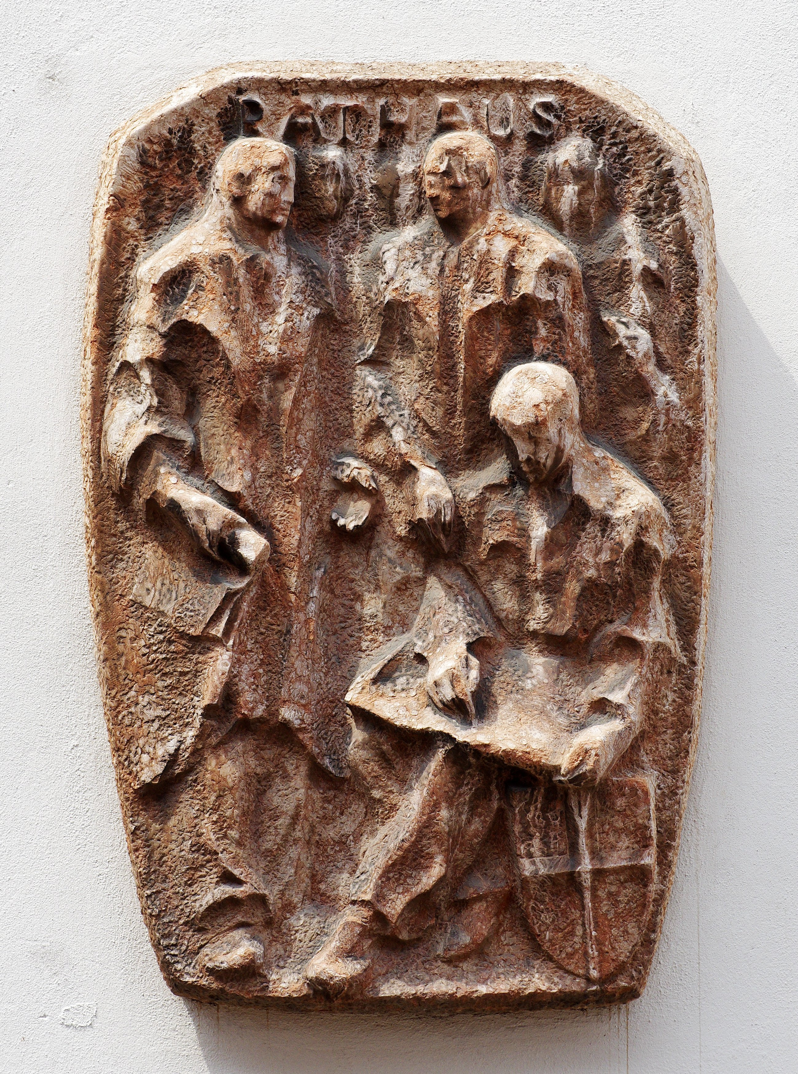 Wandrelief am Anbau des Alten Rathauses mit Ratsherren und Wappen von Nikolaus Röslmeir (1962)